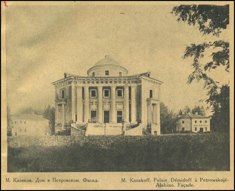 Alabino Villa near Moscow, 1776-80